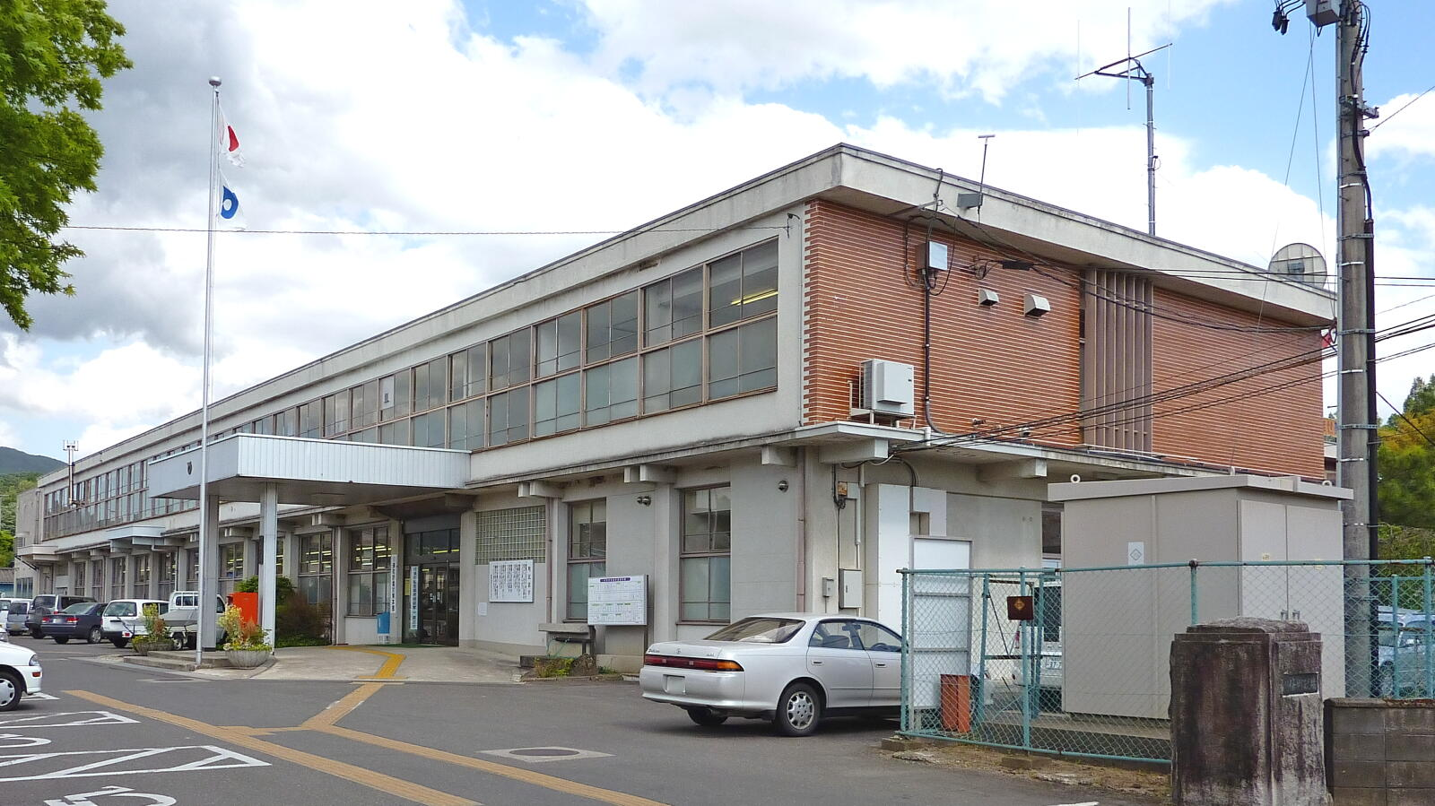 川俣町役場